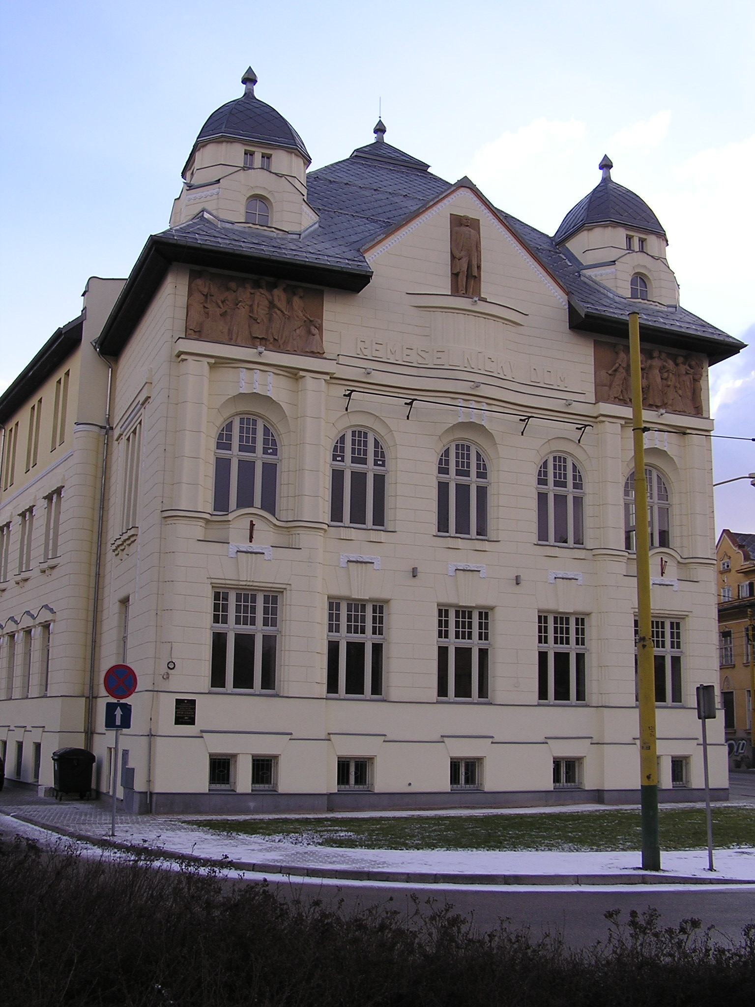 Budova administratívna, Remeselnícky dom